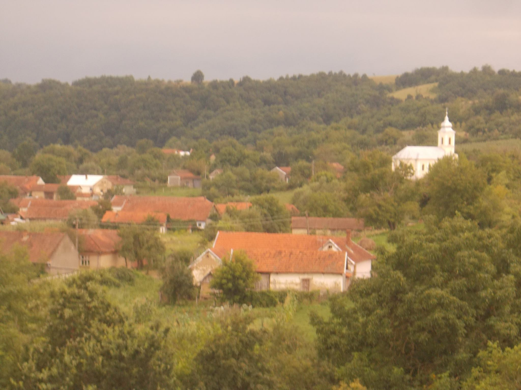 Panorama satului si biserica ortodoxa